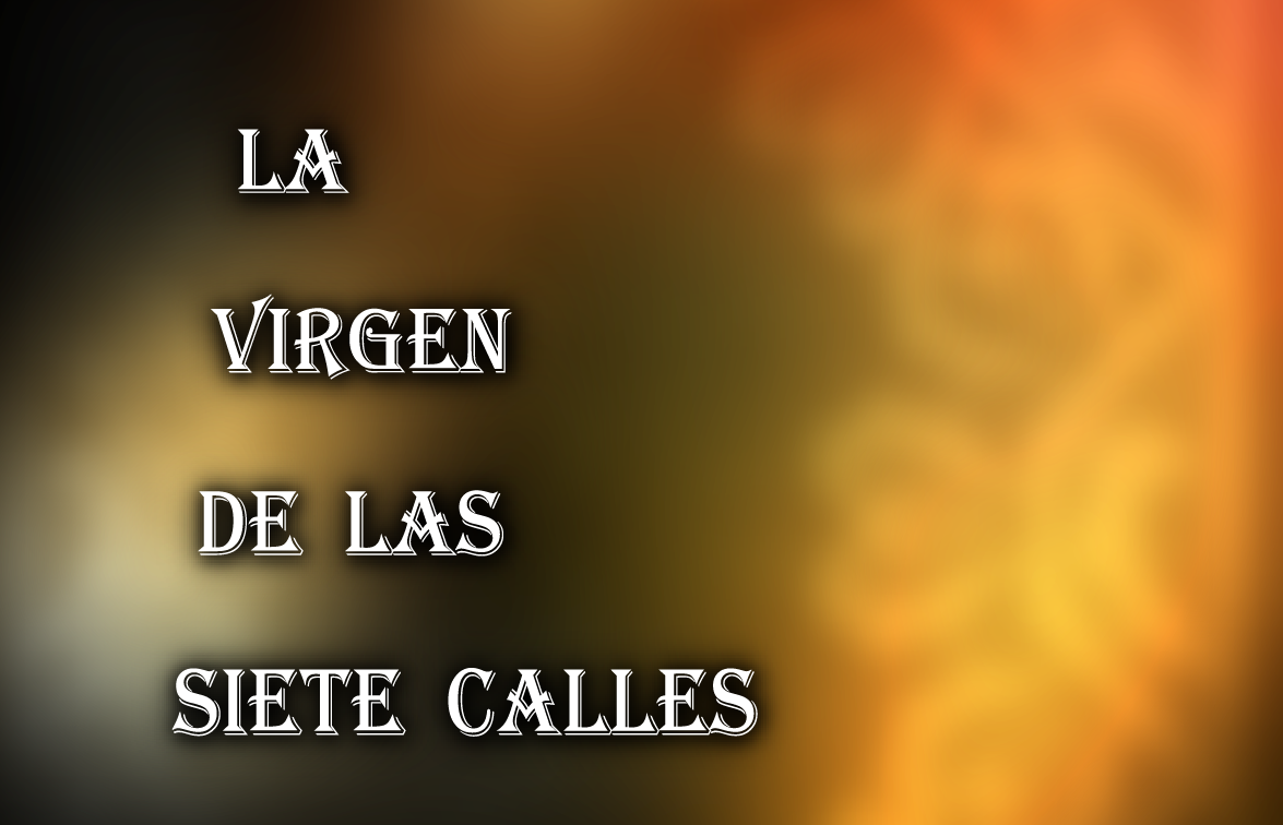 La Virgen de las Siete Calles